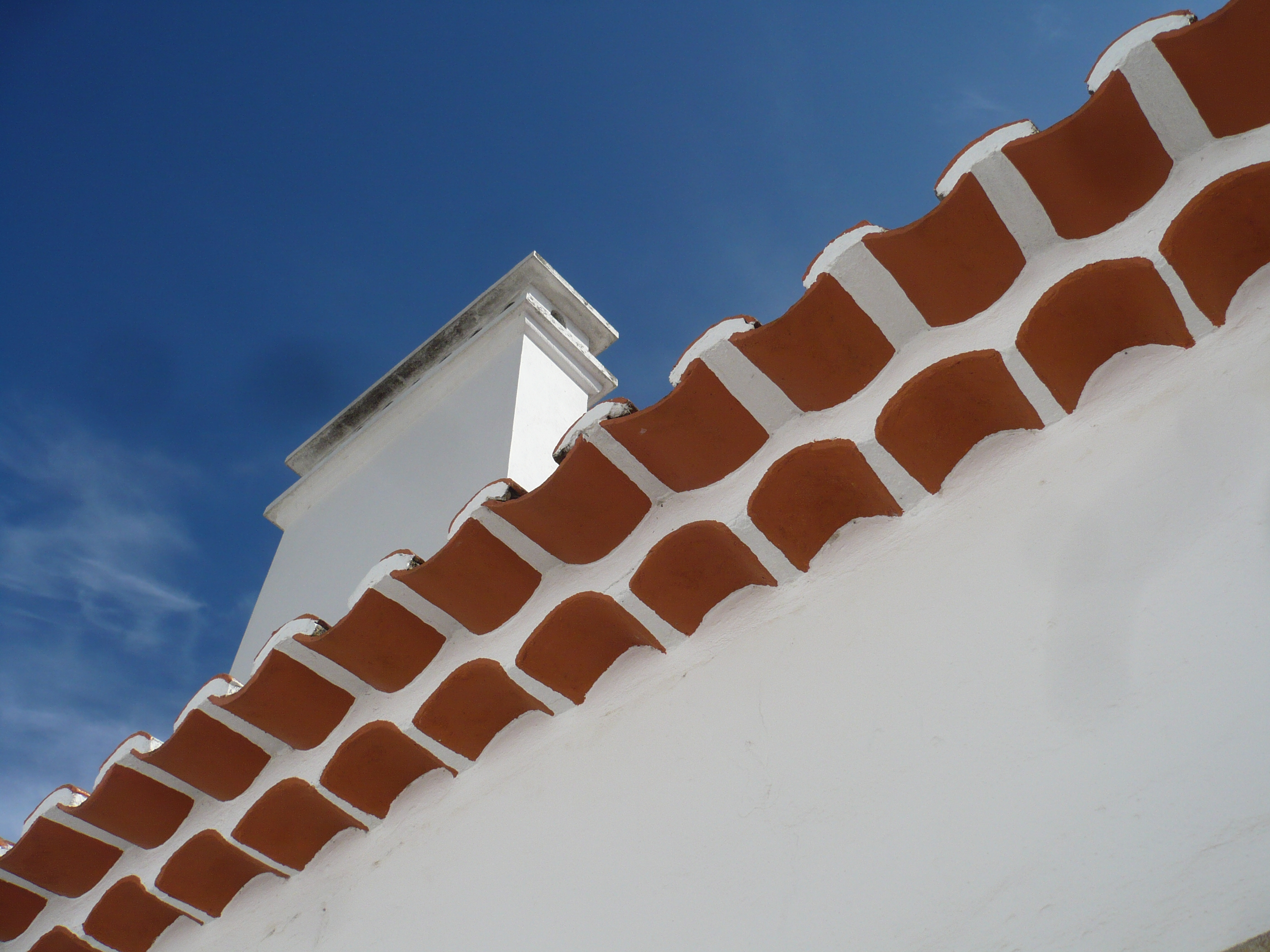 Contraste de colores